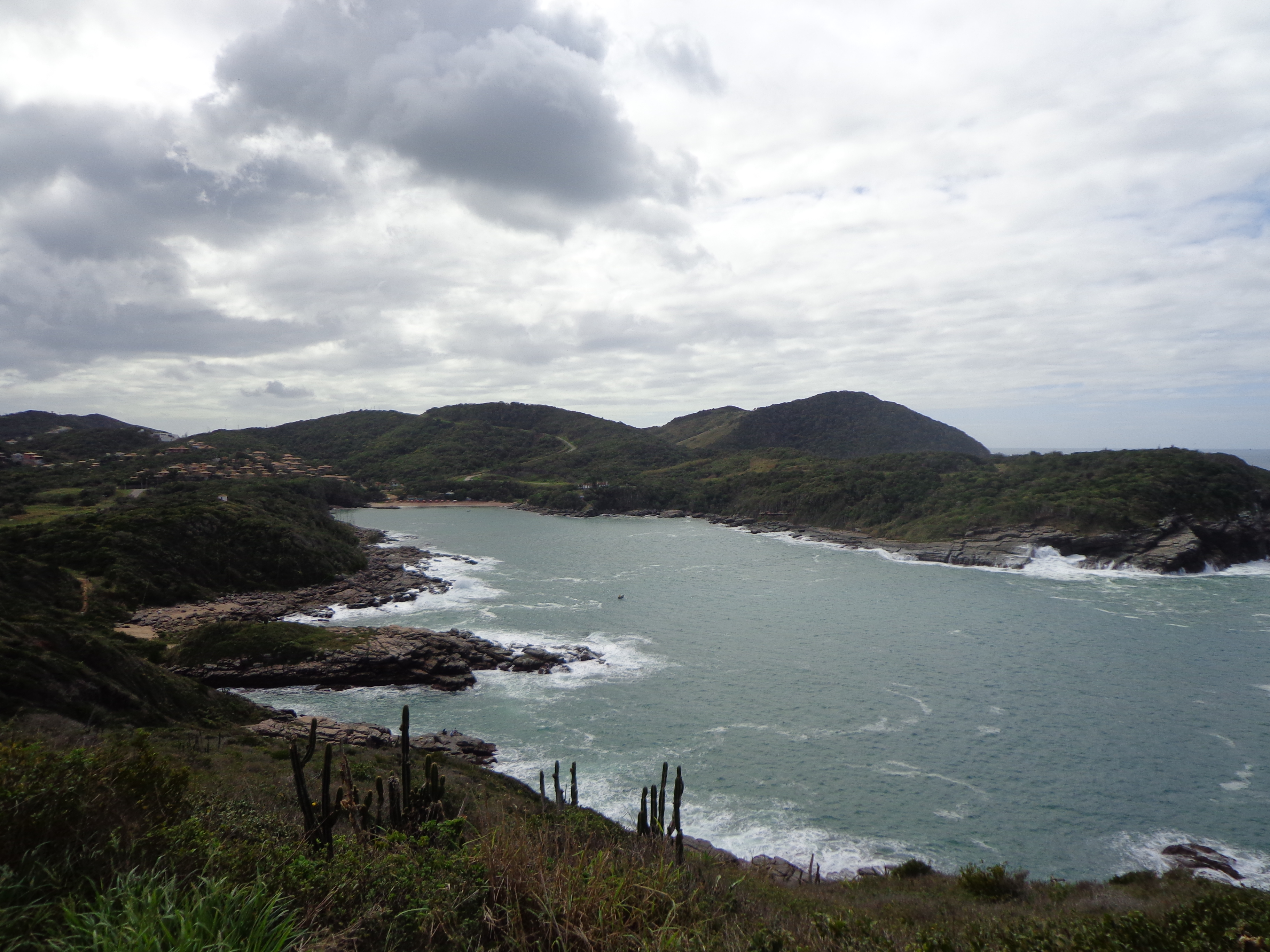 Búzios RJ Brasil - Praia do Forno